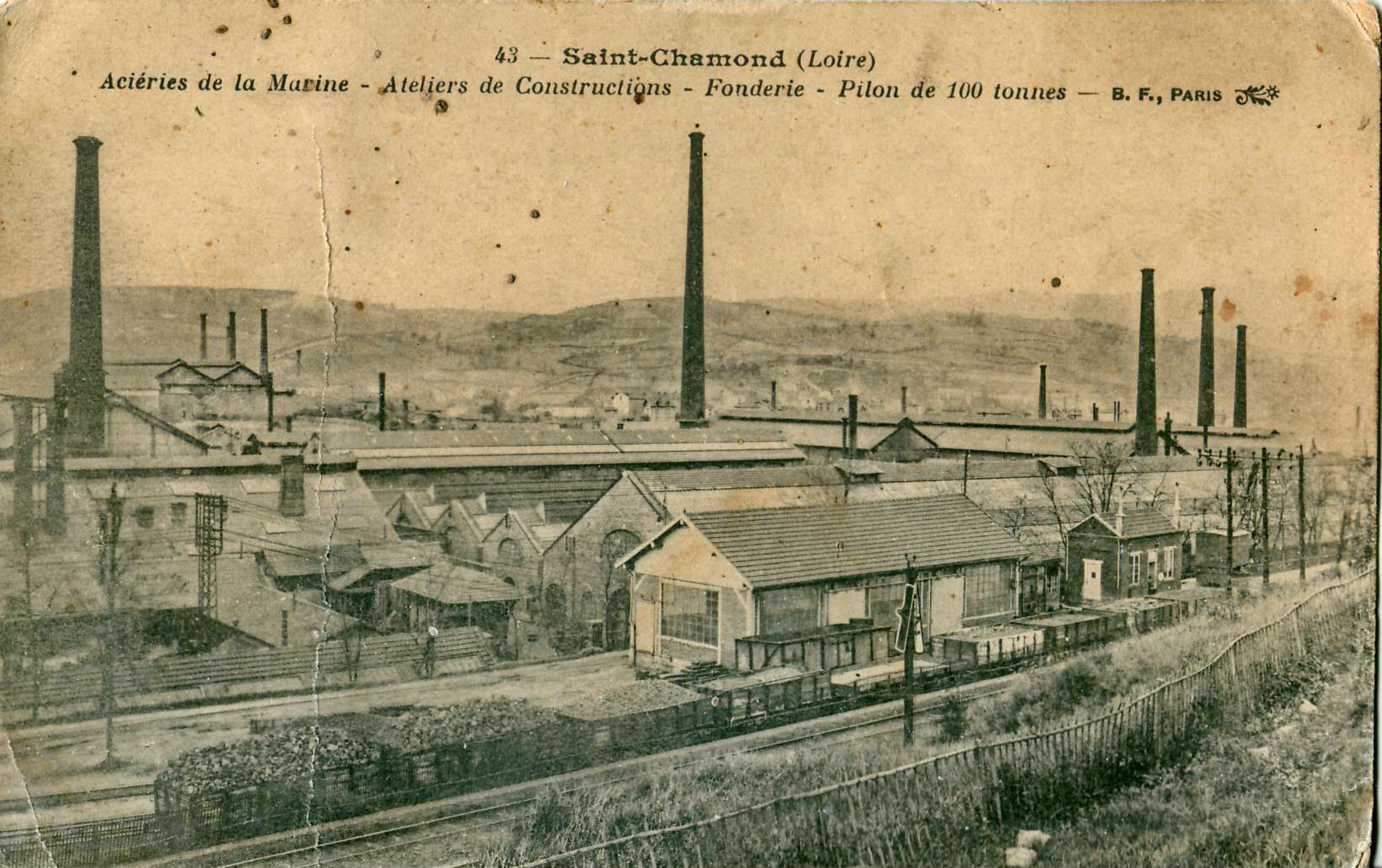 Carte postale ancienne éditée par BF à Paris, N°43 Saint-Chamond (Loire) : Ateliers de construction - Fonderie - Pilon de 100 tonnes